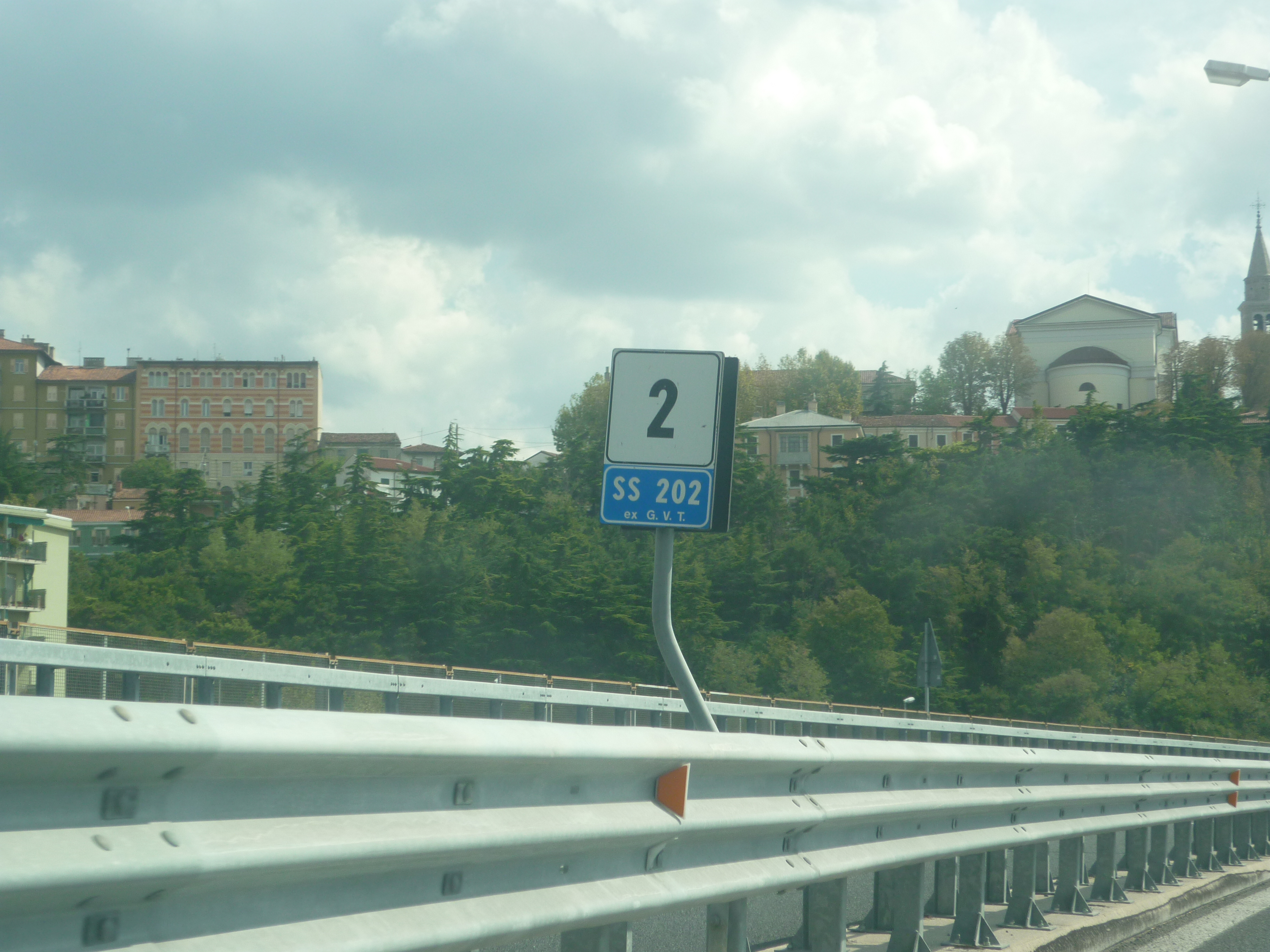 ss202